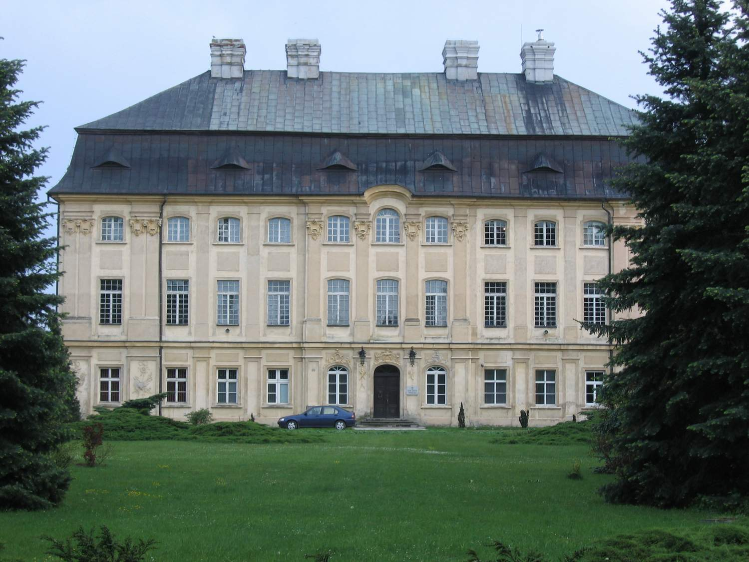 Pałac biskupi w Ciążeniu, Ciążeń, 2007r (autor:Marcin Majdecki)